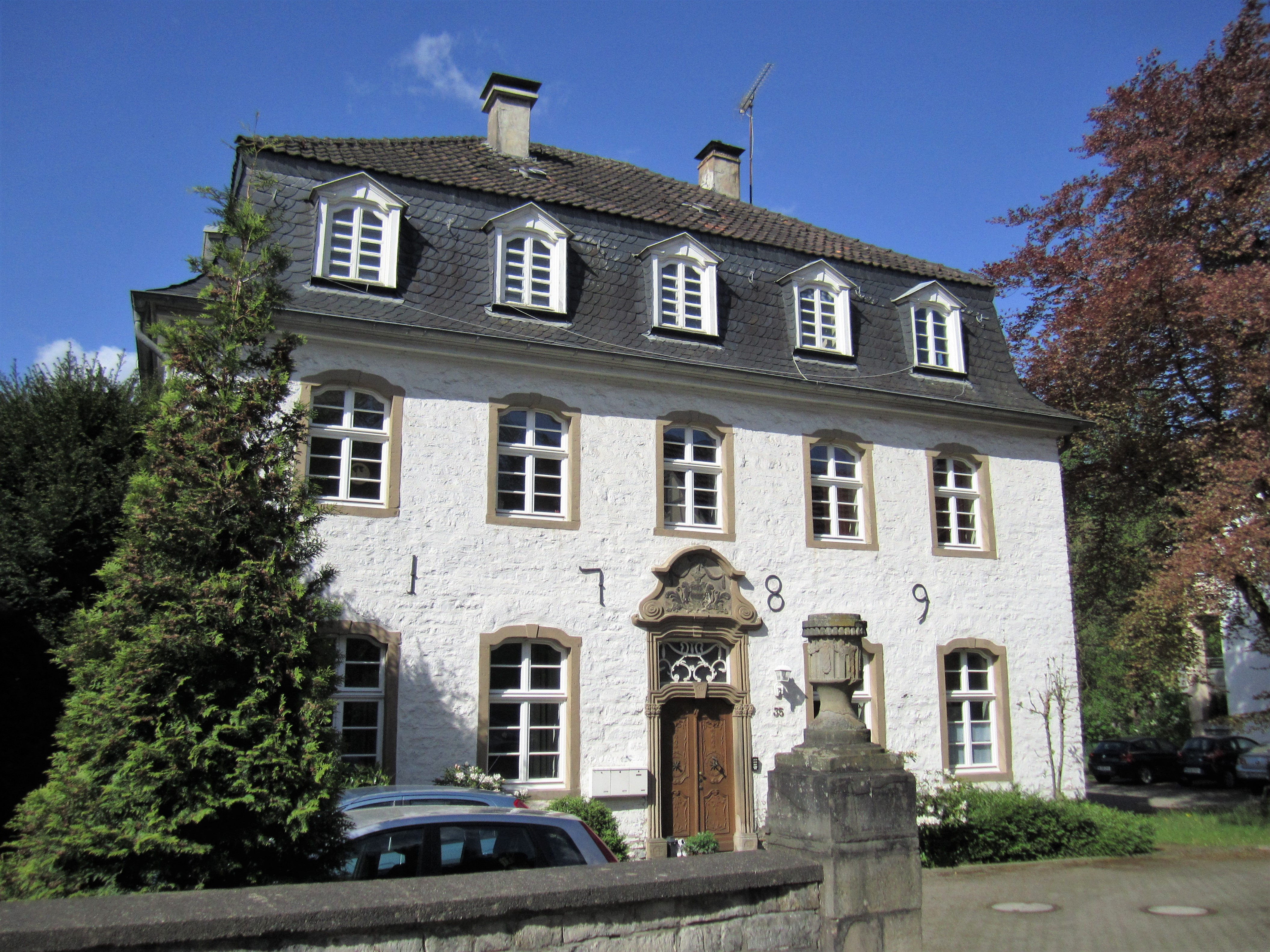 Denkmalgeschütztes Wohnhaus in Hagen-Hohenlimburg (Elsey), Im Stift 35. Erbaut 1789 im Stil des Spätrokoko. Die Bruchsteinmauer vor dem Haus mit klassizistischen, von Vasen bekrönten Pfeilern. Ehemaliges Kurienhaus des Klosters Elsey, Wohnhaus der Äbtissin Amalie Dorothea Elisabeth von dem Bottlenberg gnt. Kessel (Amtszeit 1776–1797). This is a photograph of an architectural monument.